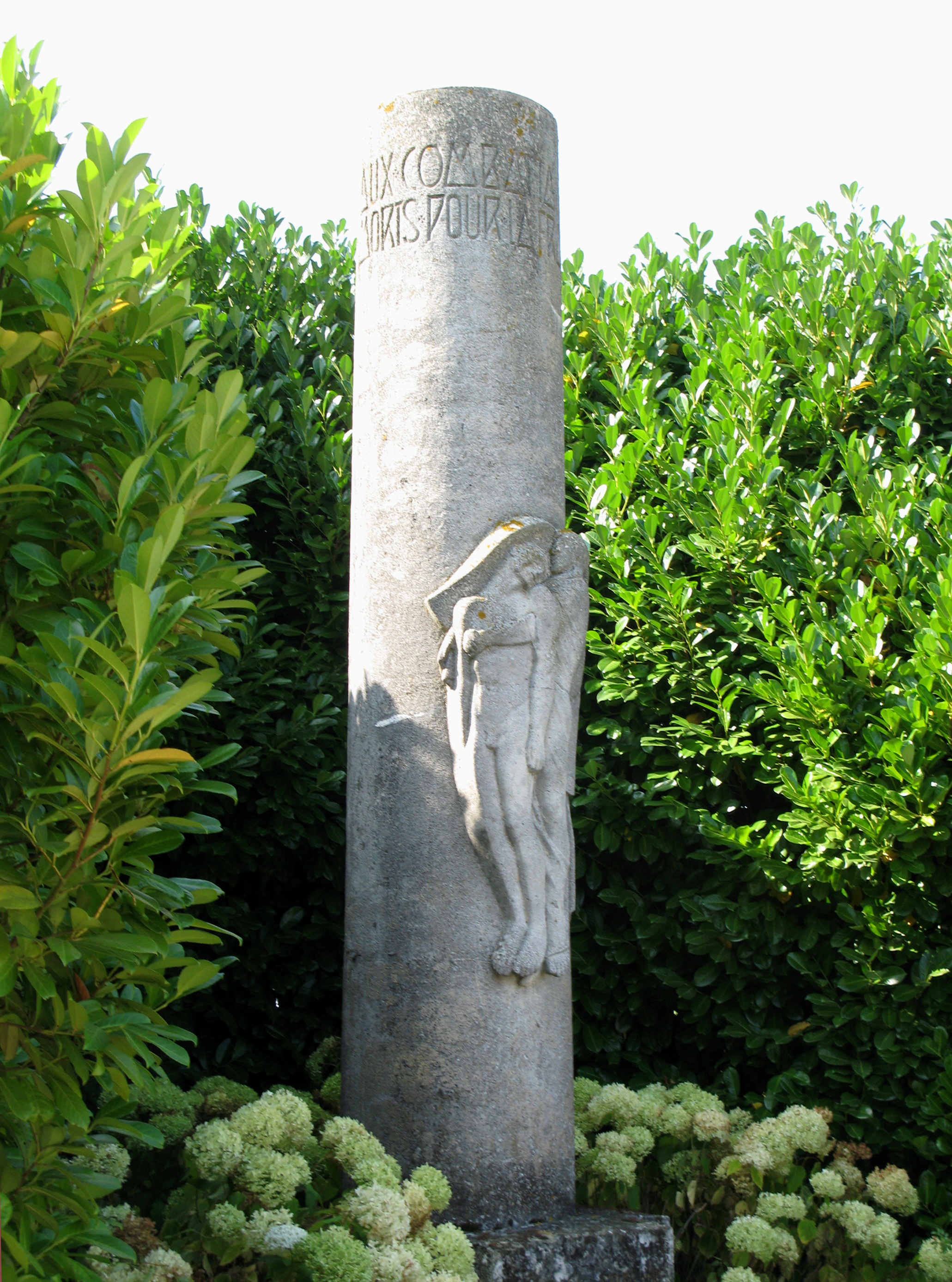 Missy-aux-Bois (Aisne, France) - Le monument-aux-morts. . .